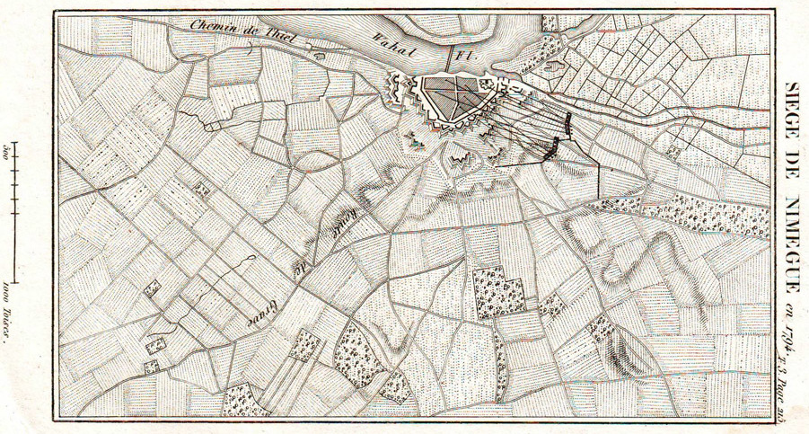 Beleg van Nijmegen in 1794. Er is een tijdelijke oeververbinding tussen Nijmegen en Lent: de schipbrug.De beschietingen van de Franse legers richting Nijmegen zijn duidelijk te zien.Ook zijn de verdedigingswerken van Nijmegen goed te zien. Schaalaanduiding is in toises (toise = in 1794 ca. 1,80 meter).